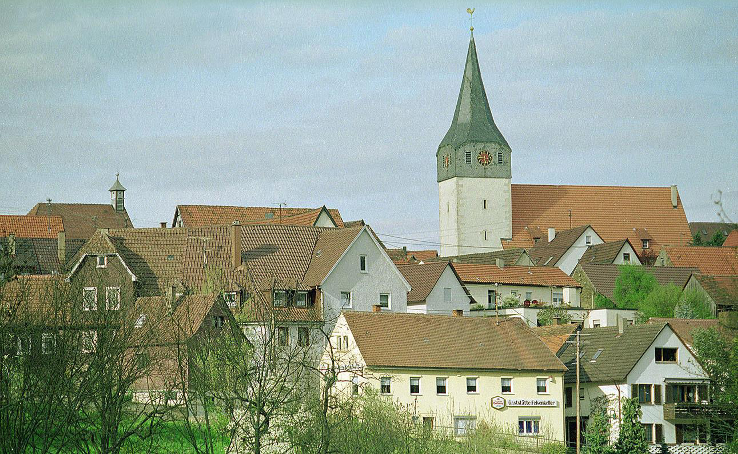 Kleinsachsenheim vom Flachsrain aus.